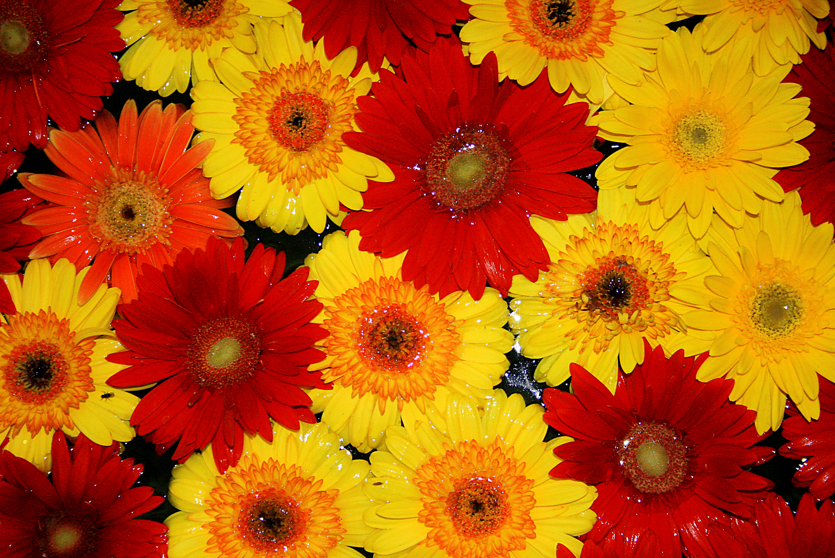 "Flores n'água" é uma foto tirada durante a expoflora em Holambra